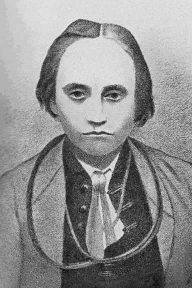 František Adamec (1866 - 1946), Římskokatolický kněz a včelařský odborník.